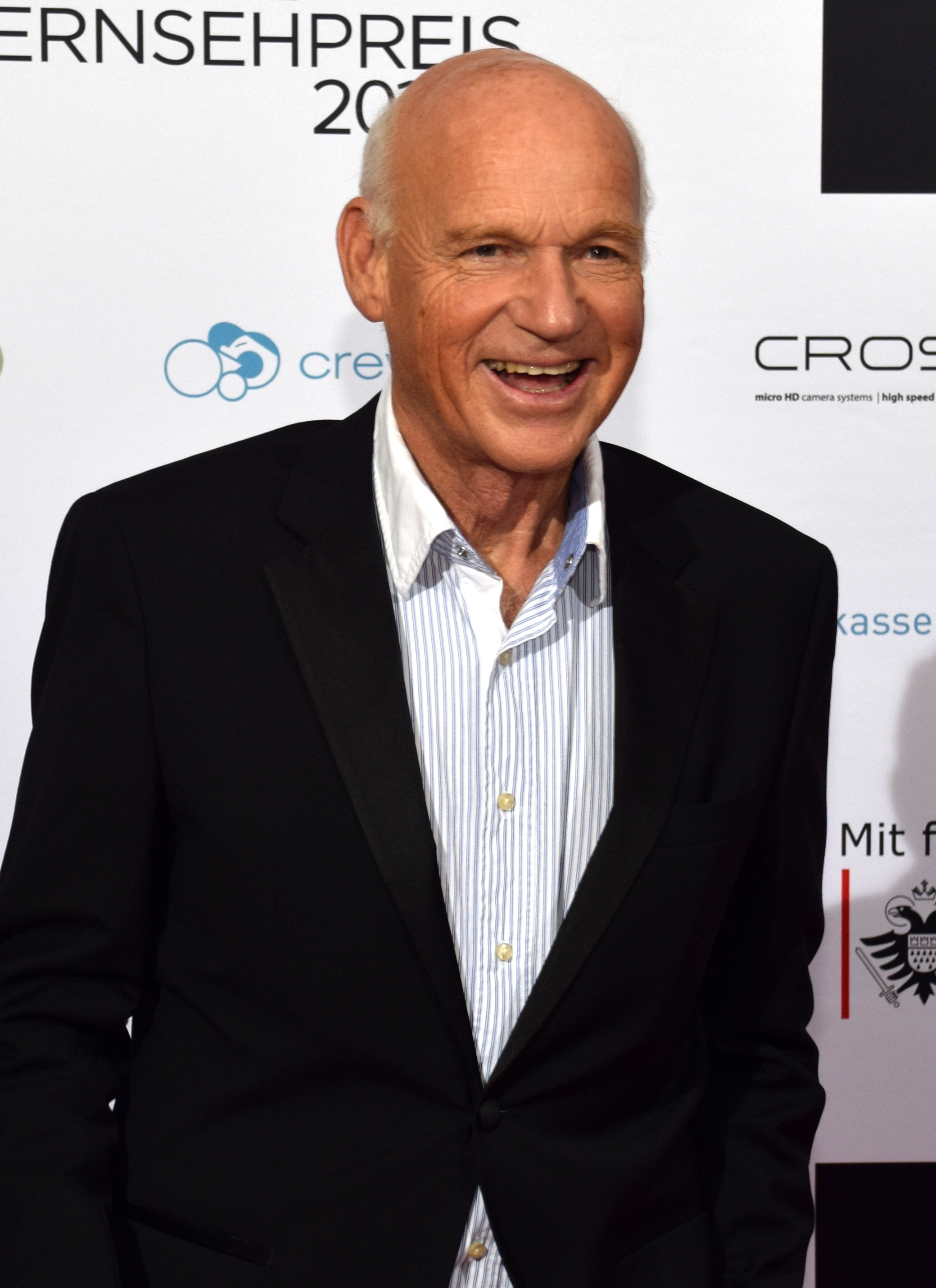 Dietrich Hollinderbäumer Schauspieler / Moderator der Preisverleihung DAFF 2015, Köln Deutsche Akademie für Fernsehen - Symposium und Preisverleihung 2015 in Köln